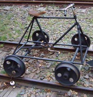 Schienenfahrrad, Meterspur, Spreewaldbahn, Erlebnisbahnhof Burg; fotografiert am 22.6.2006 von Olaf Meister